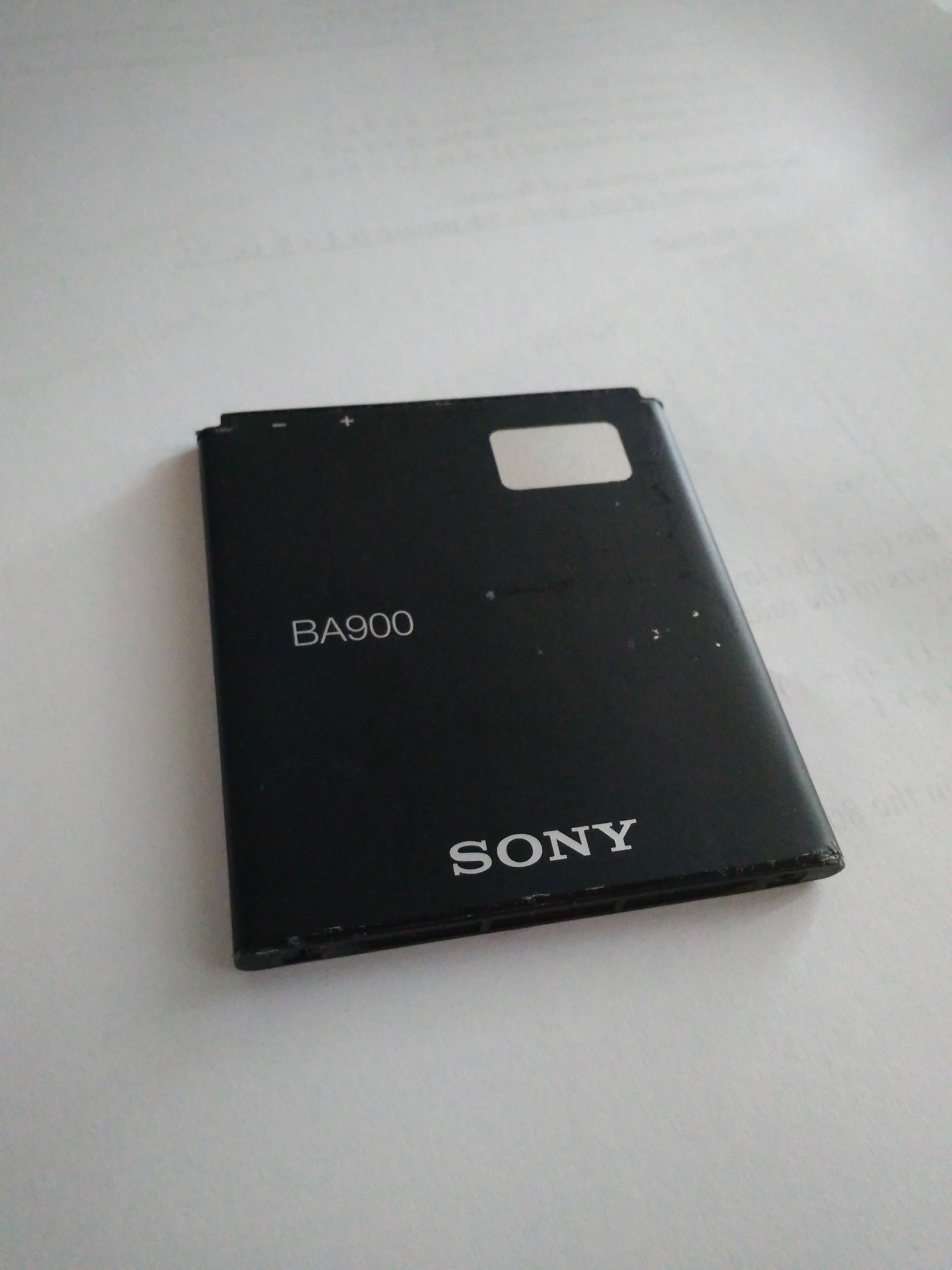 正